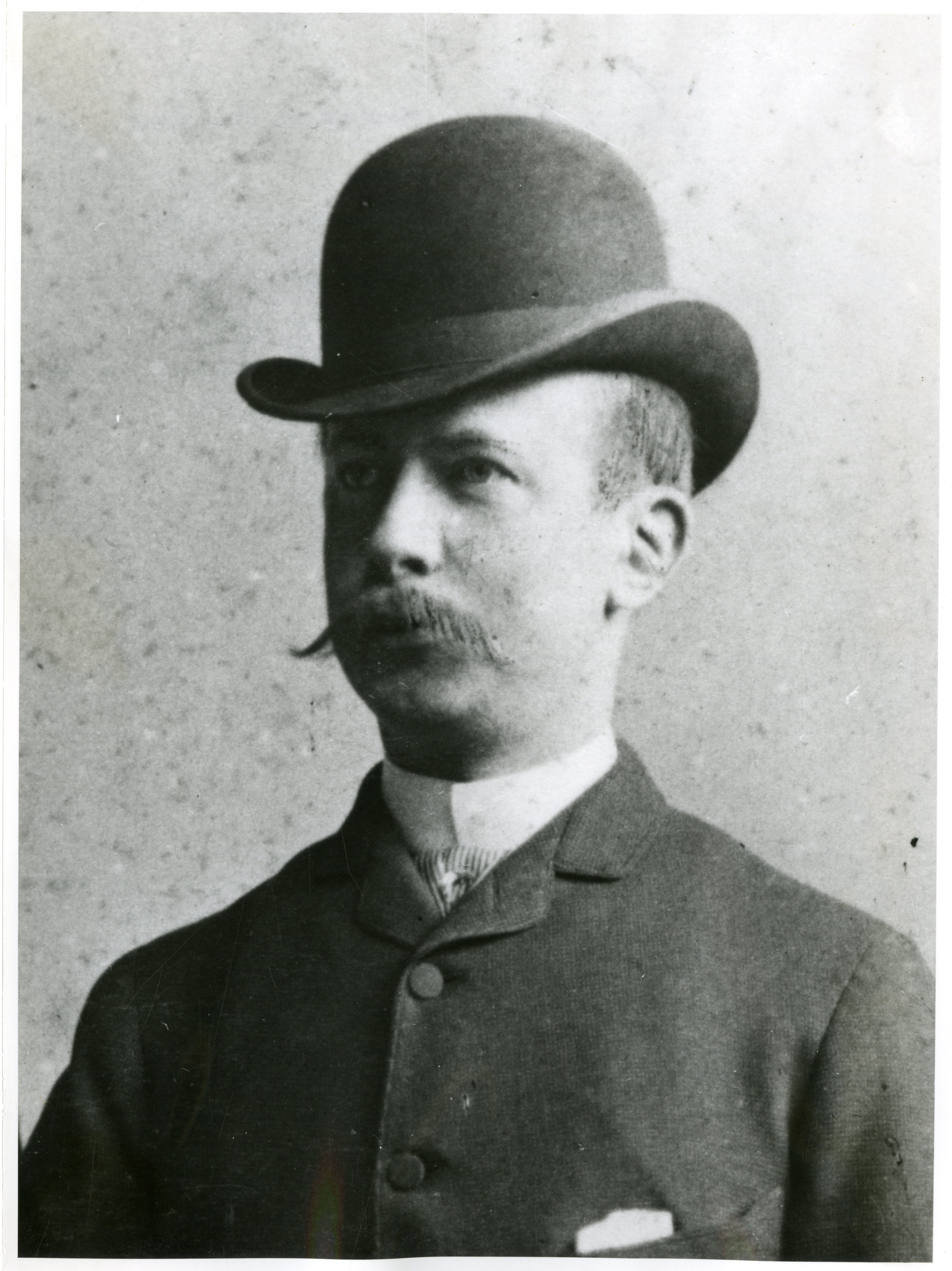 Jhr. mr. W.M. van Weede van den Berencamp, minister van Buitenlandse Zaken 22 april 1905 tot 7 augustus 1905 Collectie: Foto's Identificatienr.: 1.68415 Vervaardiger: naam [ onbekend ] Datering: ca. 1905 Opname Aantal 1 Object zwart-witfoto Afmetingen (h x b) 23 x 17 cm Aanwinstnummer 1963/181 Afgebeelde persoon: Weede van den Berencamp, W.M. van